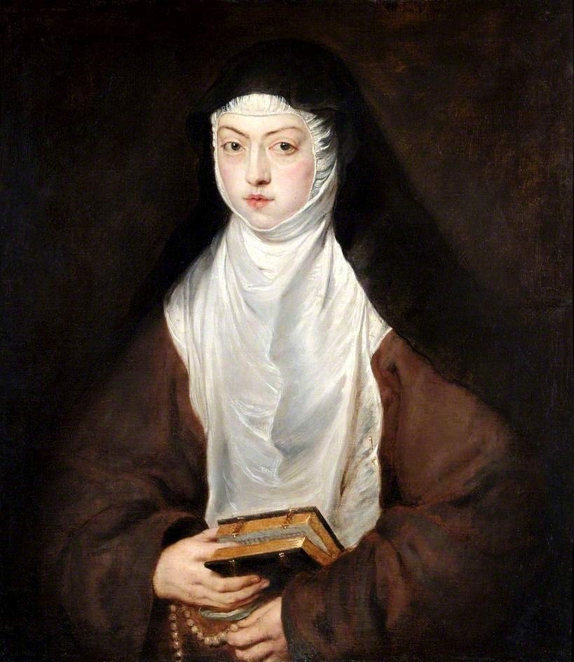 Retrato de sor Ana Dorotea de Austria (1612-1694), que fue hija ilegítima del emperador Rodolfo II de Habsburgo y monja en el monasterio de las Descalzas Reales de Madrid, ciudad en la que falleció en 1694.